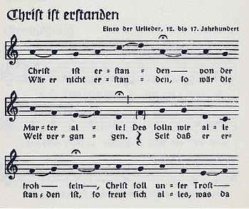 Christ erstanden überschrieben mit seinem Incipit